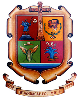 escudo de huandacareo